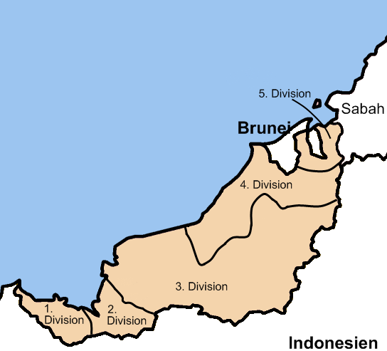 Die ehemalige, von den weißen Rajas eingeführte Einteilung des malaysischen Bundesstaates Sarawak in 5 Verwaltungsdivisionen.